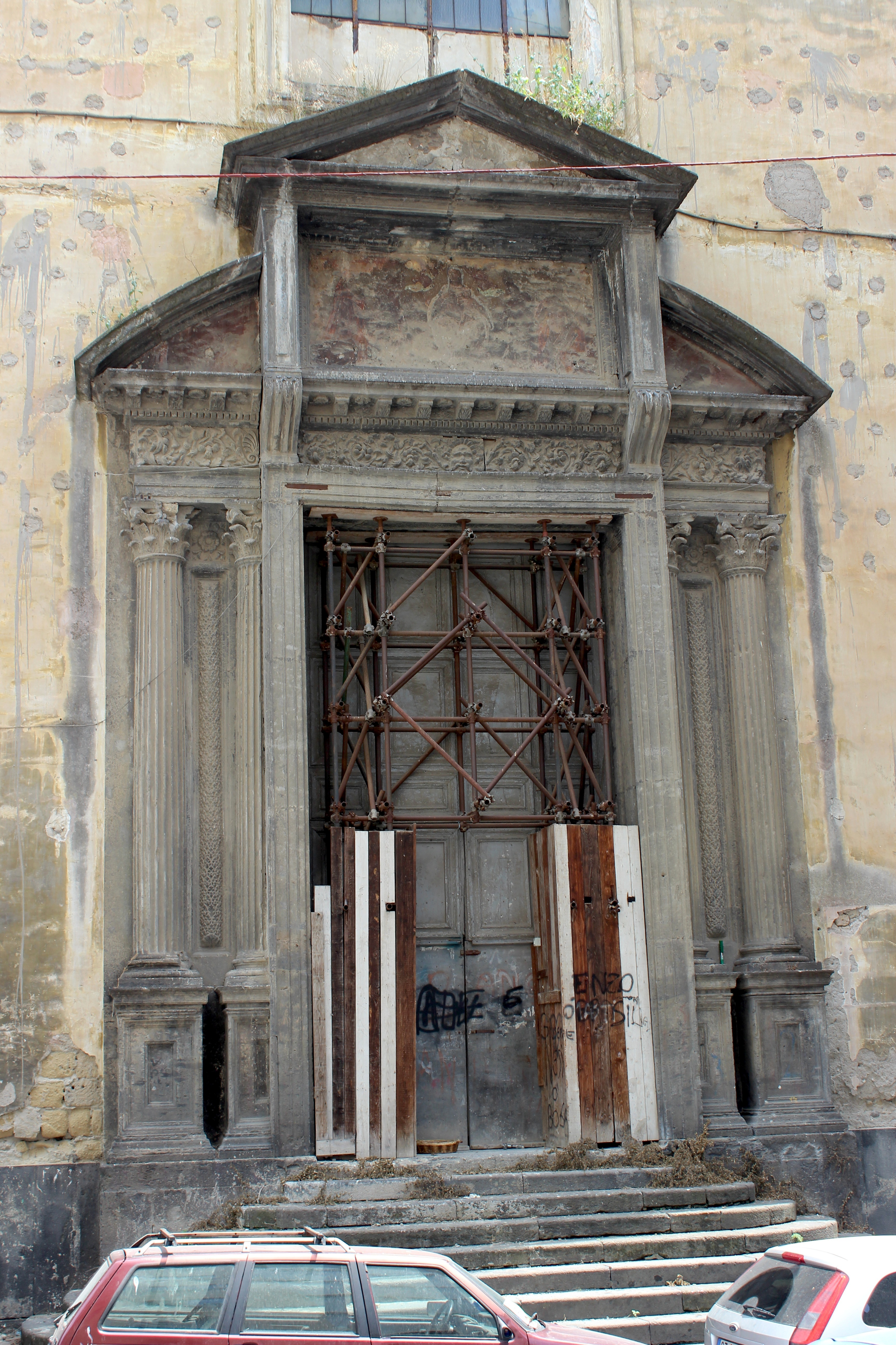 Nápoles. Fachada de la iglesia de Santa Maria delle Grazie a Caponapoli.